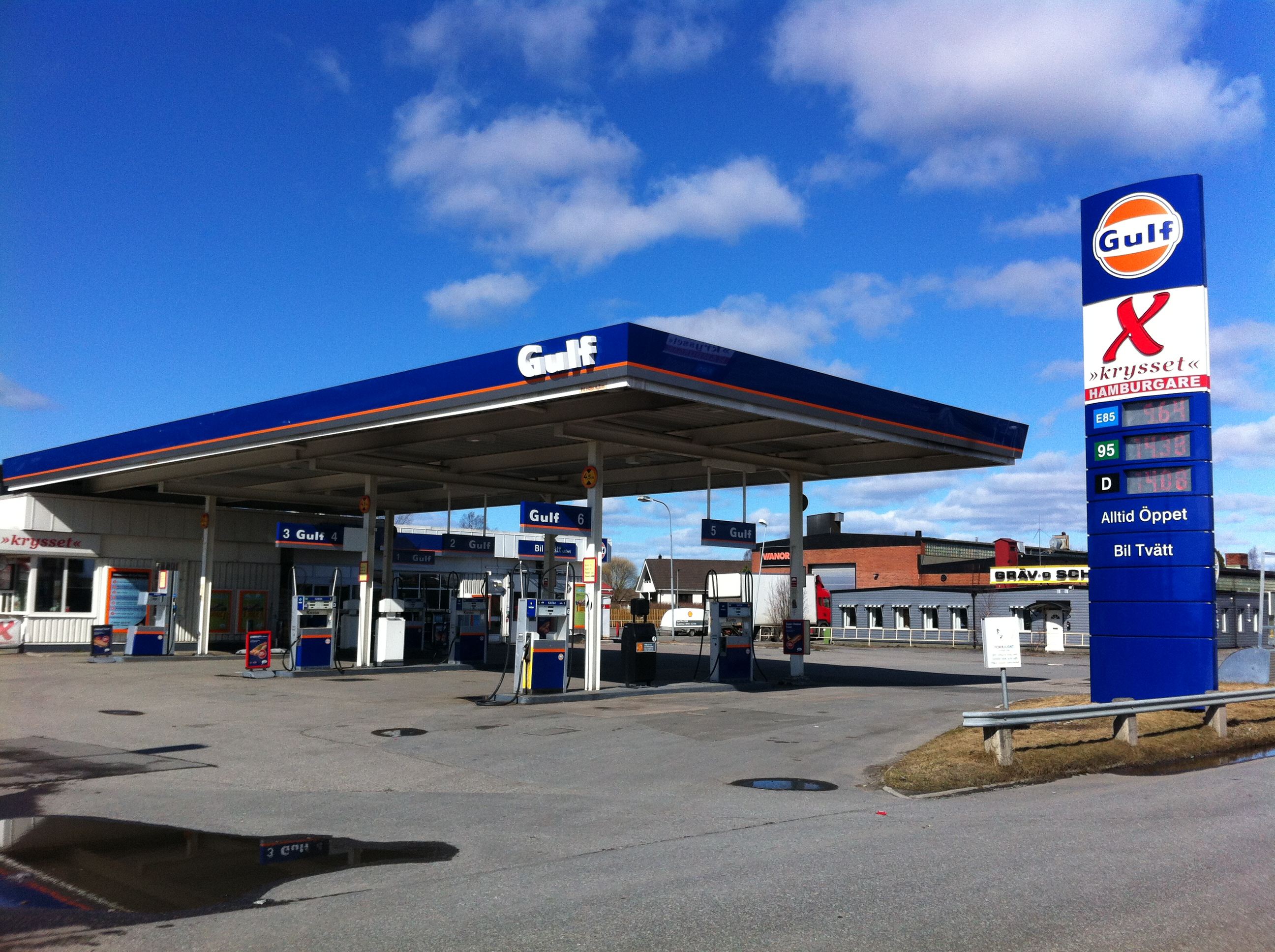 Den första Gulfmacken sedan 1983 öppnar i Skellefteå.